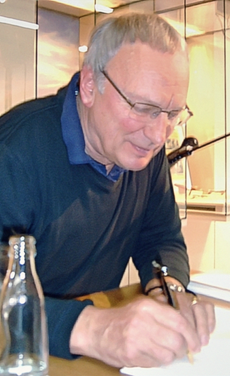 Uwe Timm, November 2005, Rheinisches Landesmuseum, Bonn